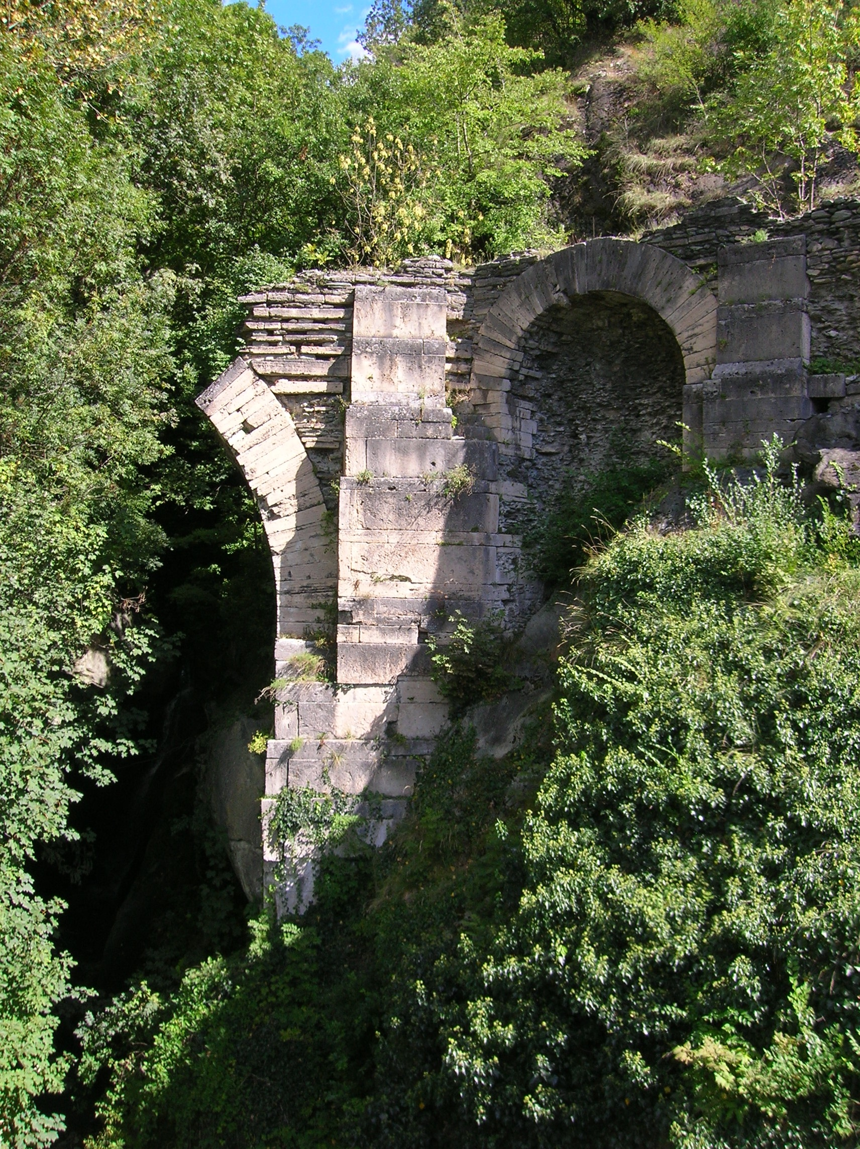 Ponte Romano su Via delle Gallie, Saint-Vincent, Valle d'Aosta, Italia. This is a photo of a monument which is part of cultural heritage of Italy.